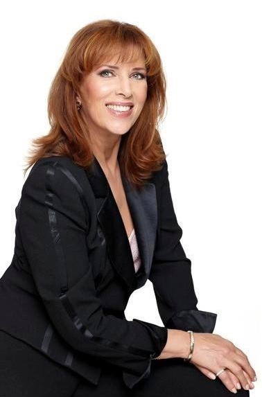 Artisten Sylvia Vrethammar.